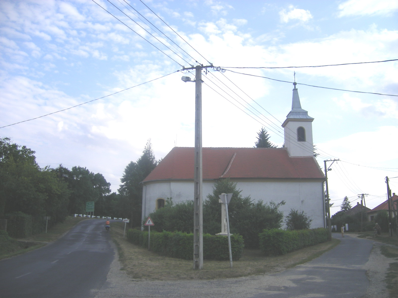 Kám, Szent András apostol templom